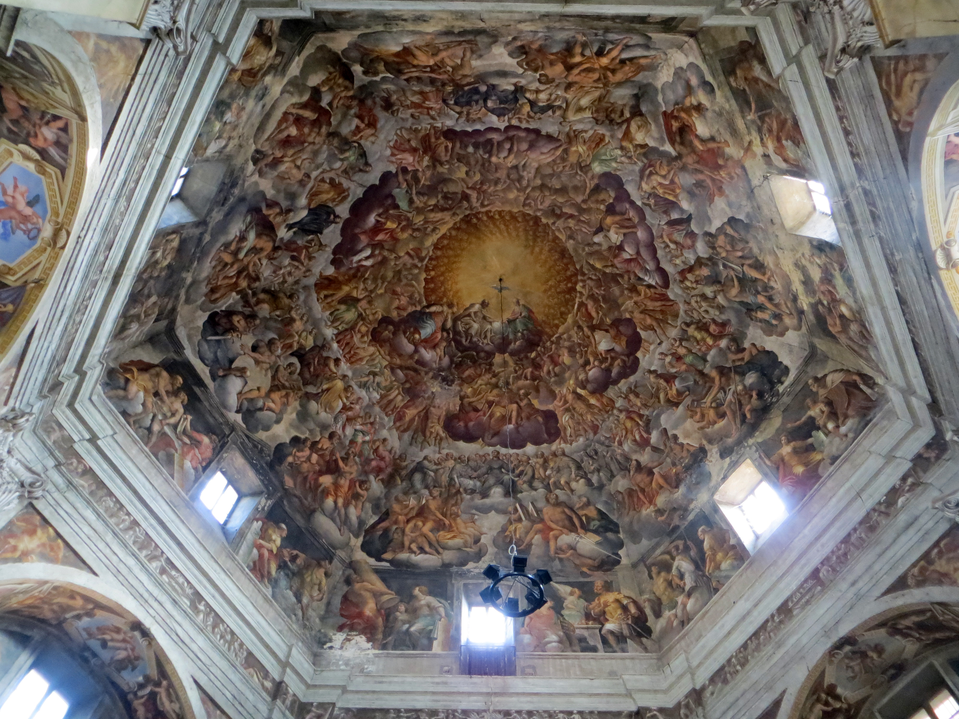 Chiesa di Santa Maria del Quartiere (Parma) - cupola